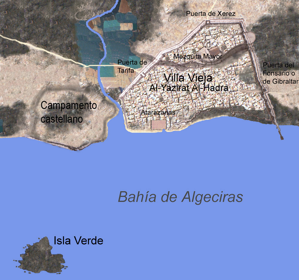 Mapa indicativo de la situación de la Villa Vieja de Algeciras, Andalucía (España), anterior al siglo XIII.